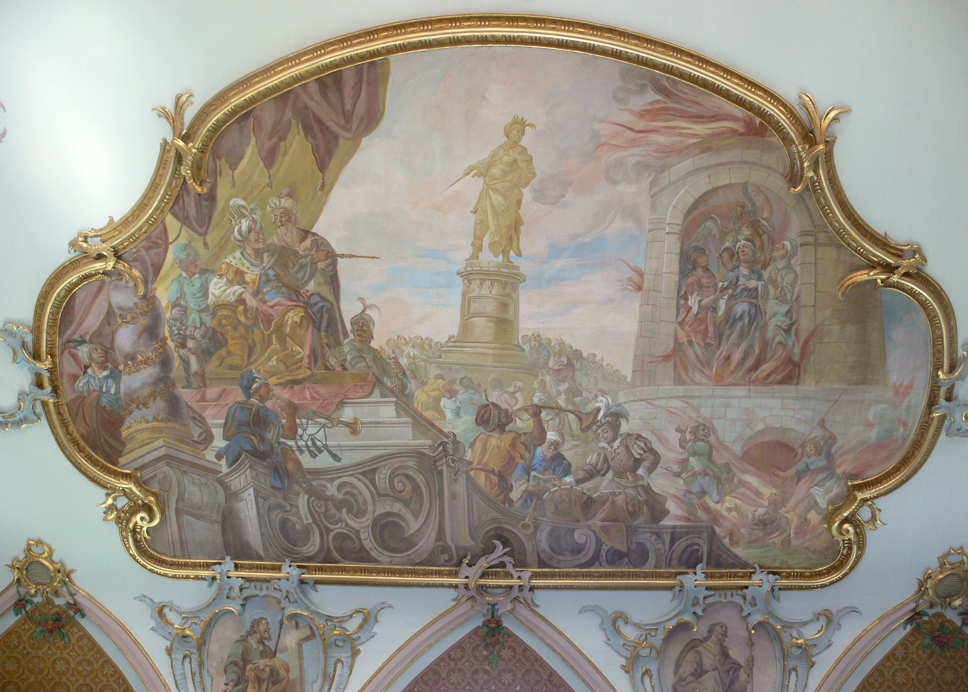 Pfarrkirche St. Pankratius, Wiggensbach Deckengemälde im nördlichen Querschiff: Franz Joseph Hermann: „Drei Männer im Feuerofen“ nach Daniel 3 (The Fiery Furnace; from the Book of Daniel, 3) Stuck von Johann Georg Wirth